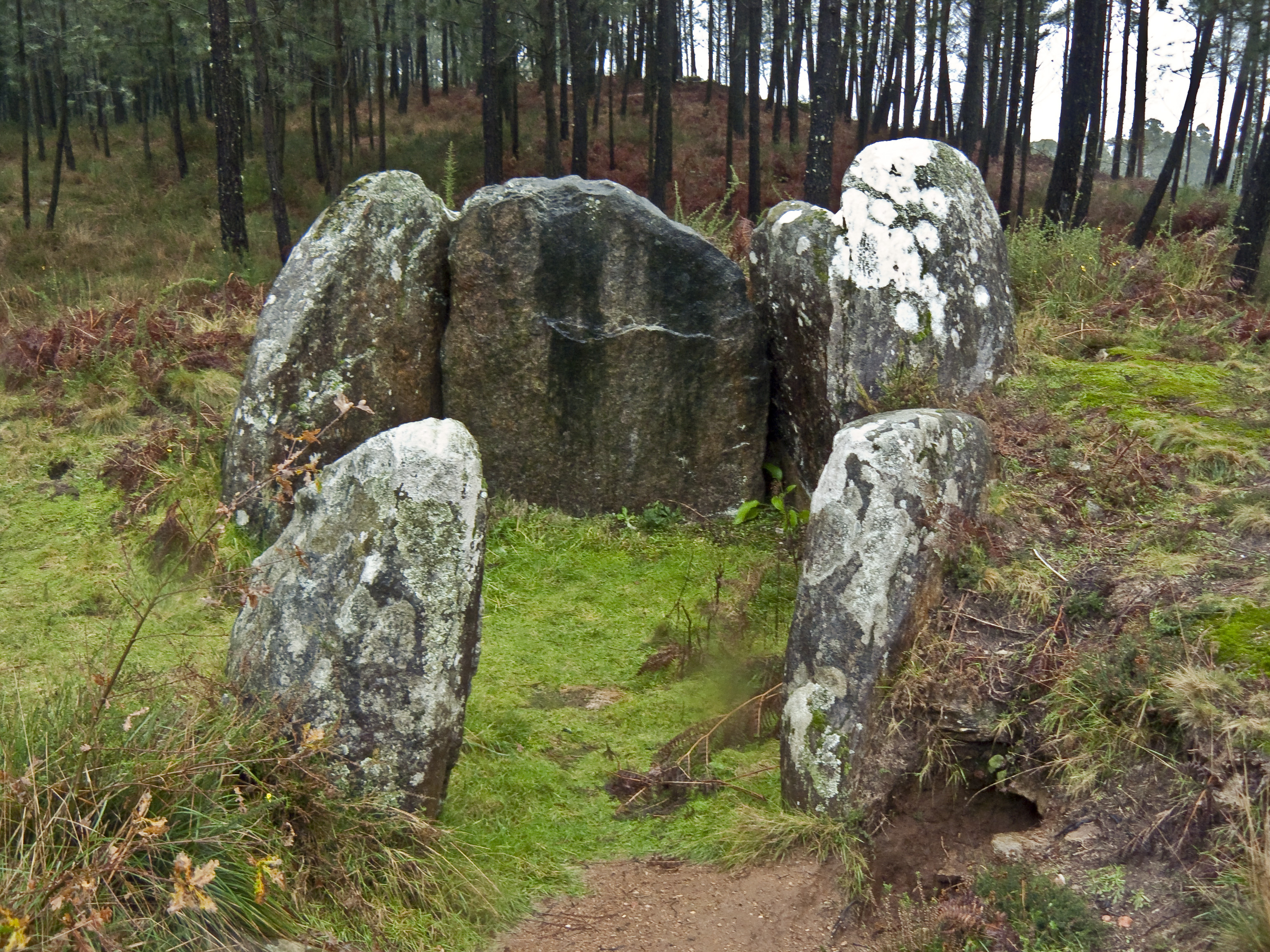 Mámoa do Rei - Trasmañó, Redondela . Necrópole de Monte Penide. "Cortello de mouros"